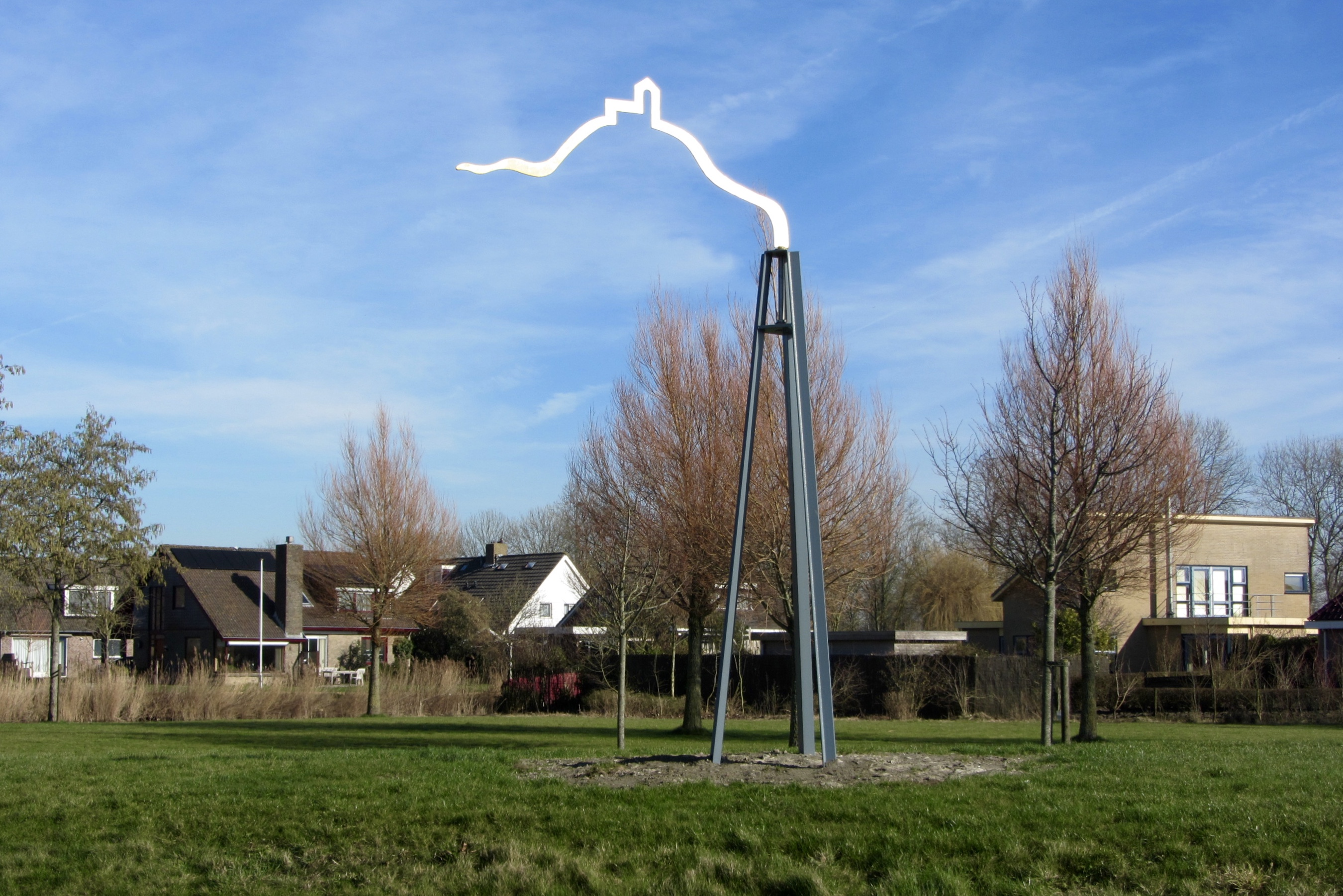 Een duidelijke markering voor Hallum en een uitnodiging om het prachtige terpdorp te bezoeken. Een windvaan die als een lijn in de lucht de vorm verbeeldt van een terp met een kerk. Een gouden weerkaatsing van licht boven Hallum.